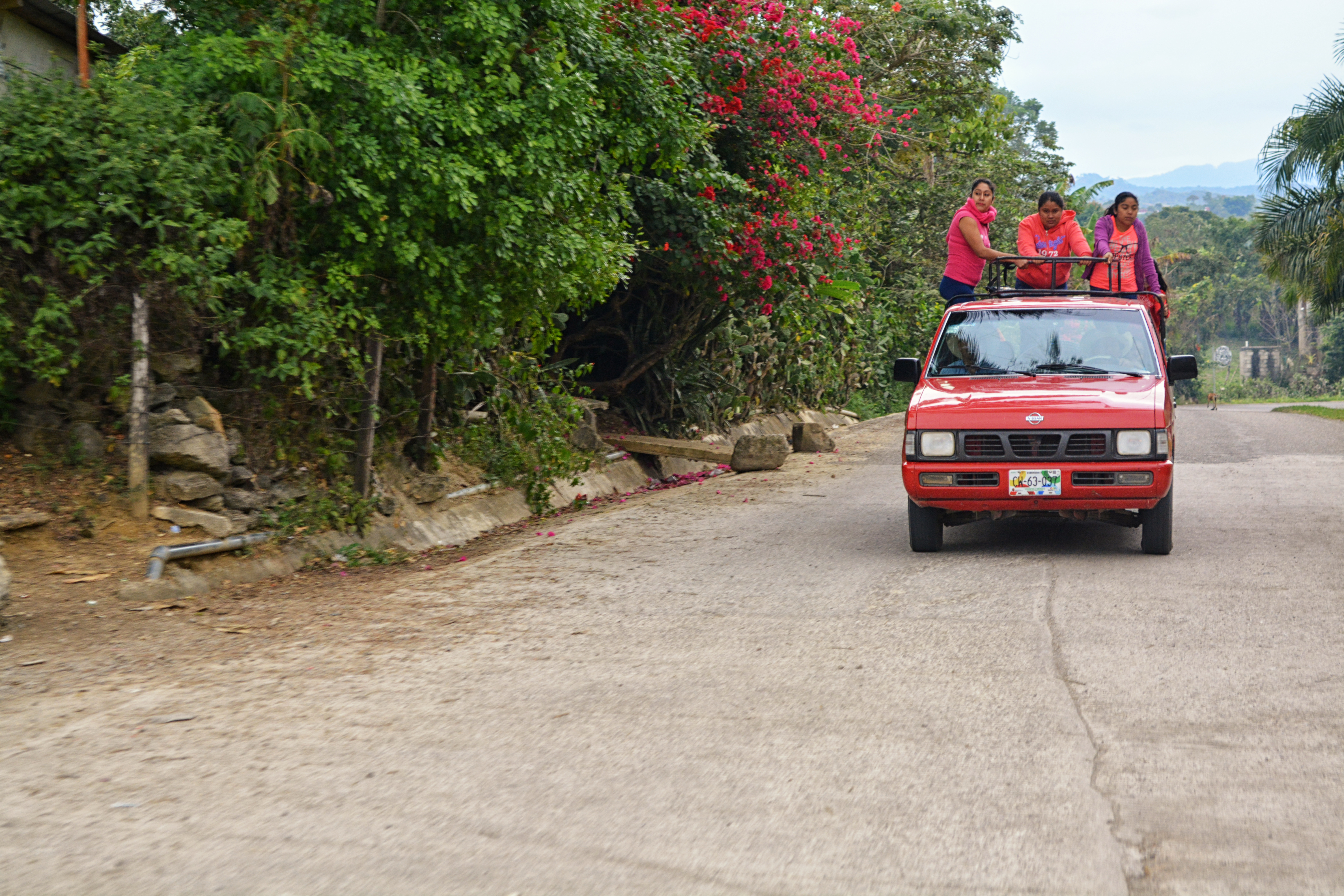 Mujeres en pickup Nissan de transporte público. Camino a Toniná, Ocosingo, Chiapas.